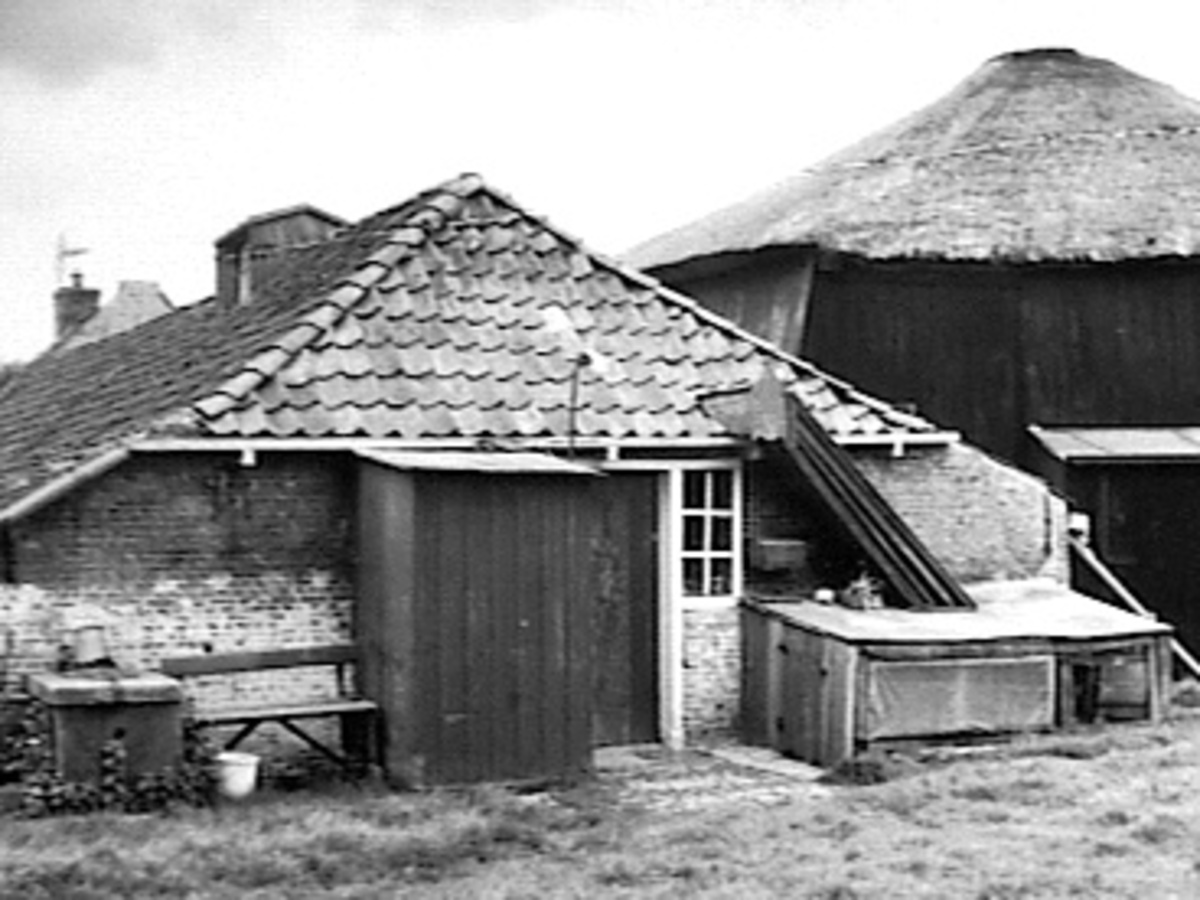 Veenweidestreek/ Boerderijen: achtergevel van Olst, deel 1 blz. 205 (opmerking: Deze afbeelding hebben wij helaas alleen in deze lage resolutie.)